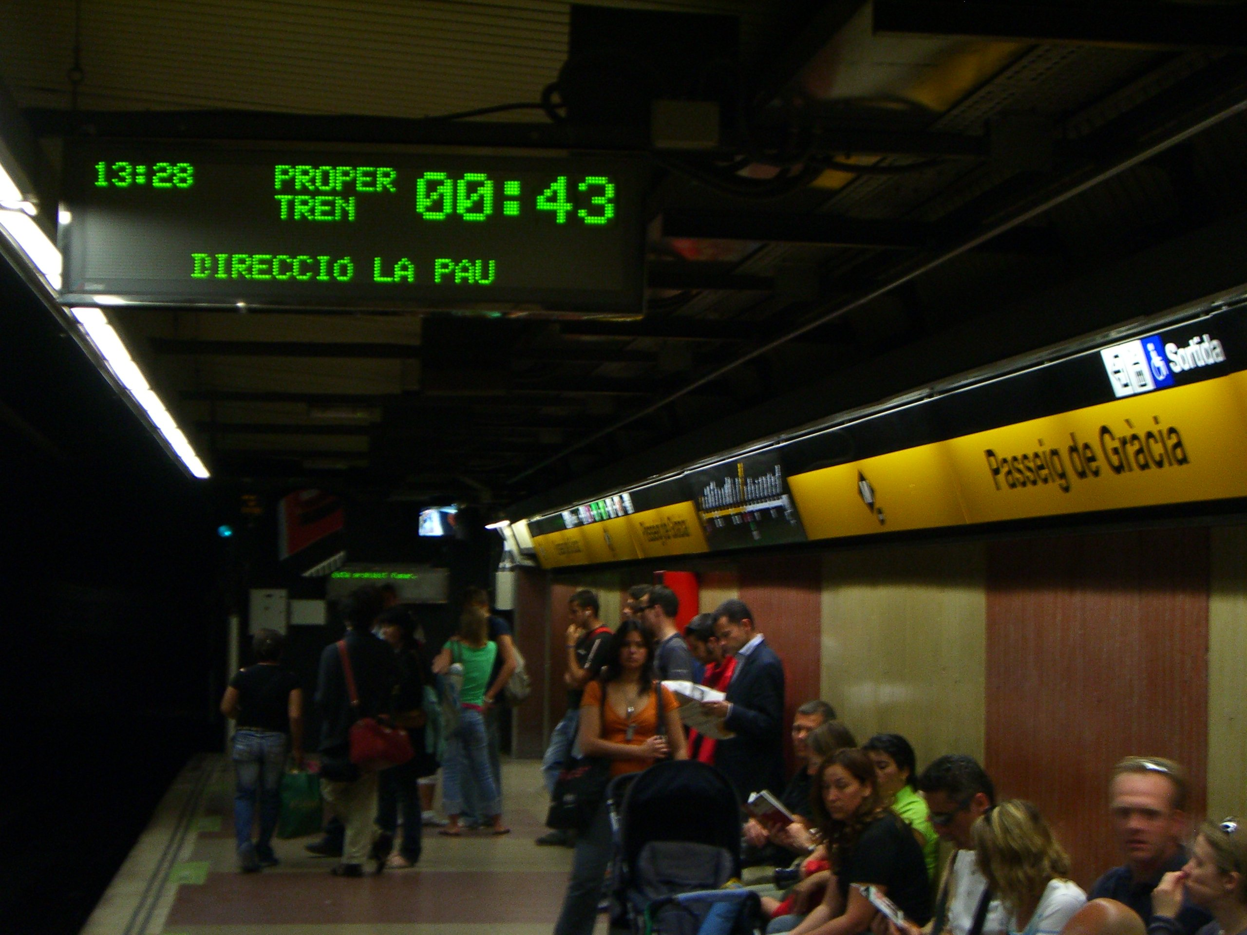 Passeig de Gràcia (metrostation), Barcelona